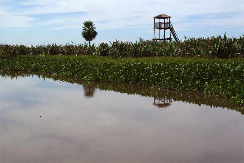 Parque Nacional Río Pilcomayo